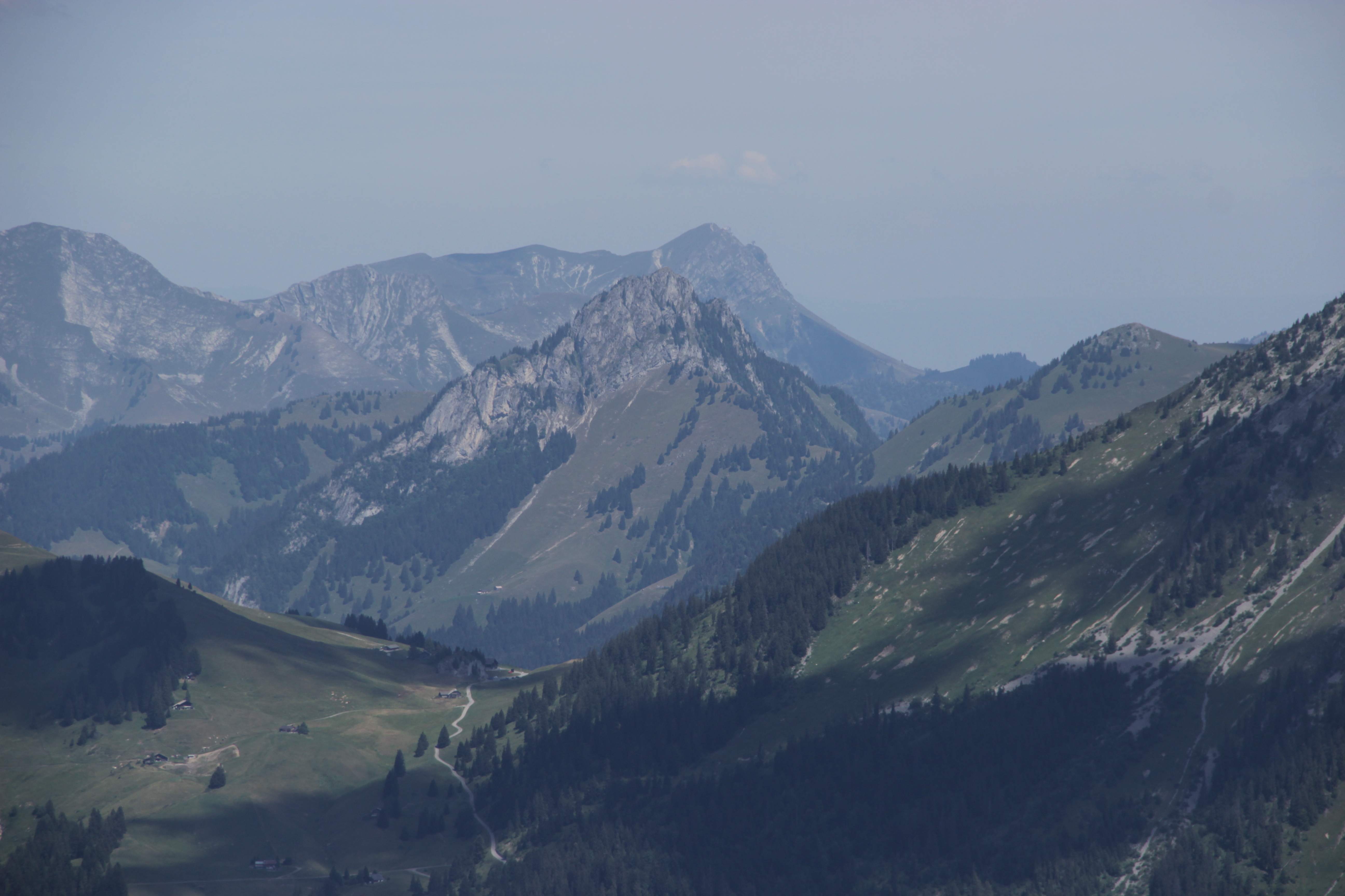 Col de la Pierre du Moëlle, Dent de Lys, Le Moléson and Dent de Corjon